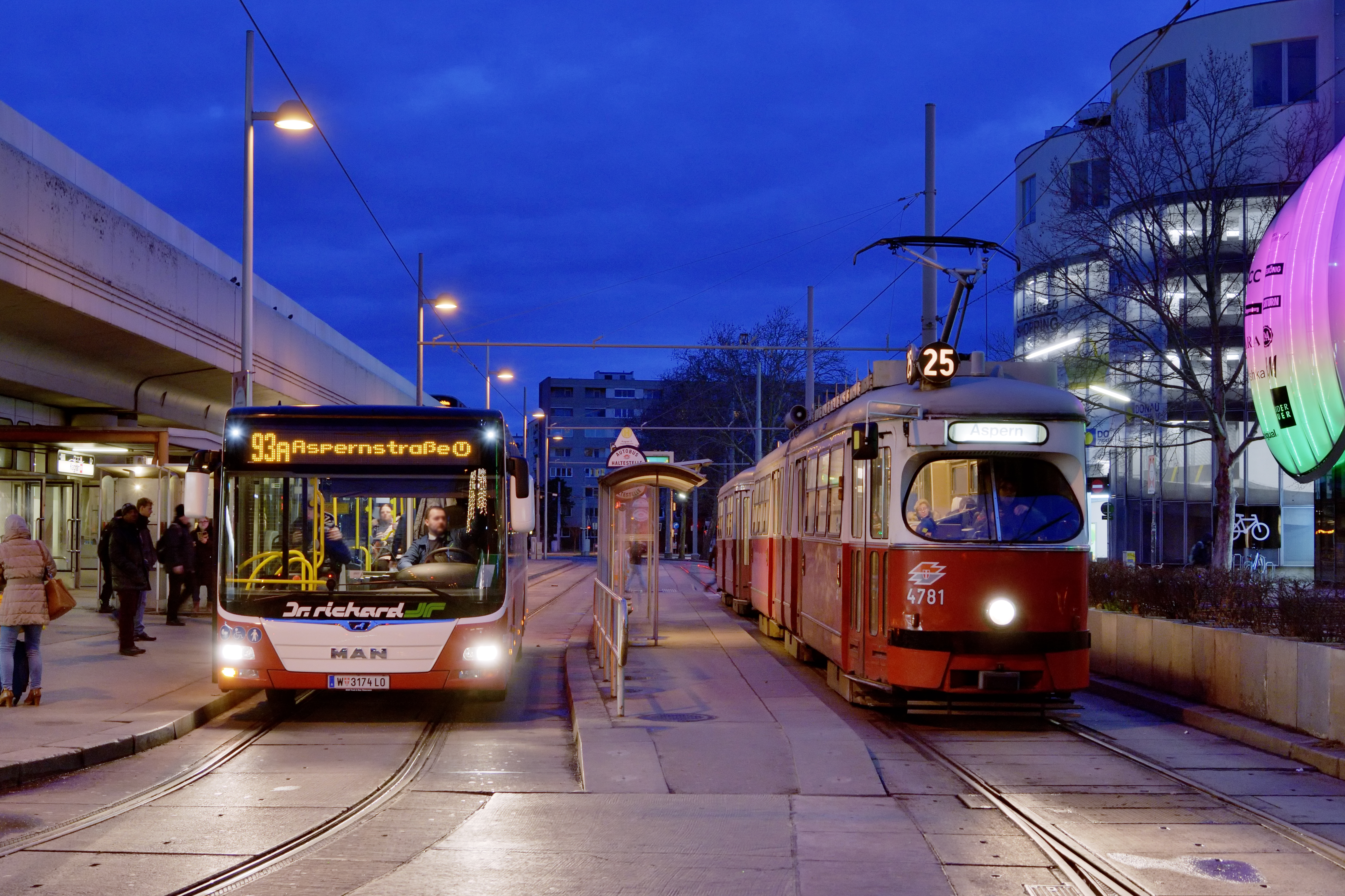 E1 4781 + c4 als Linie 25 in der Hst. Kagran